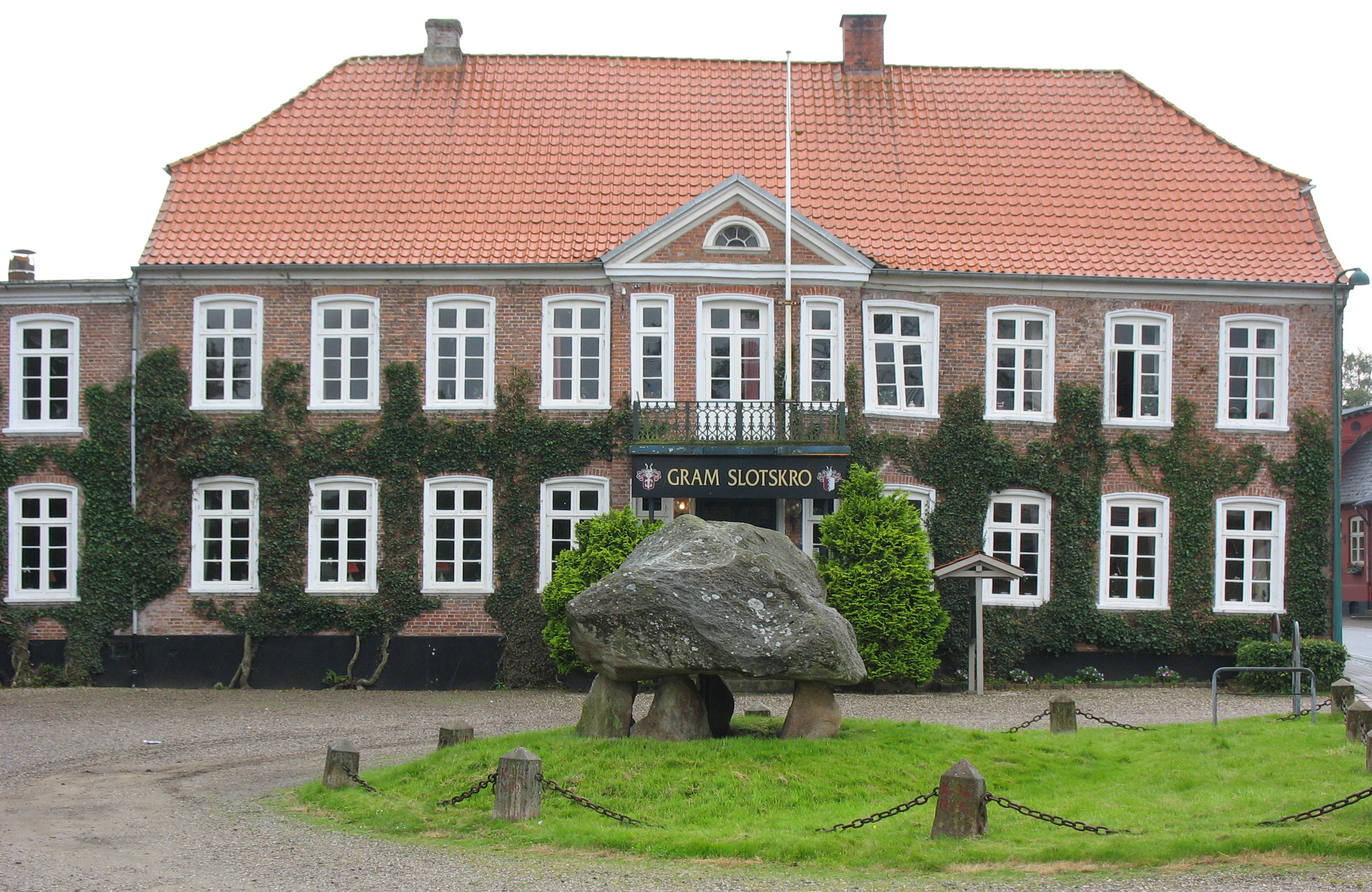 Gram Slotskro i juli 2007.